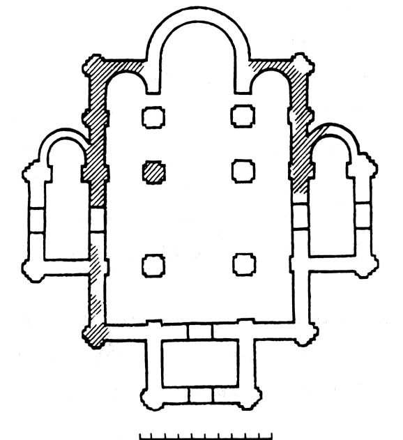 Царква на дзядзінцы